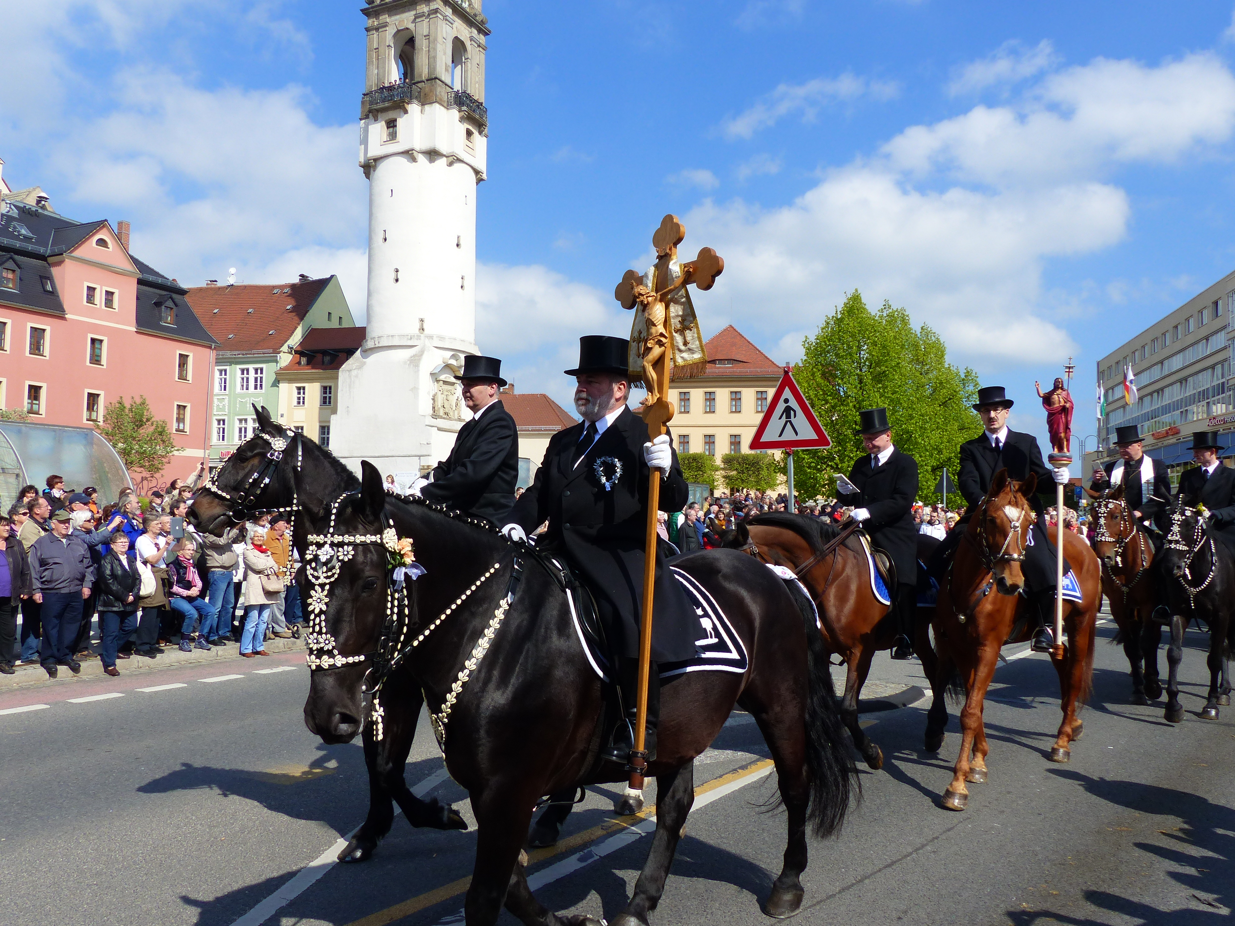 Bautzener Osterreiter Prozession 2014